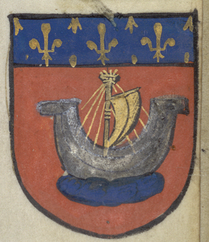 Écusson de la ville de Paris.